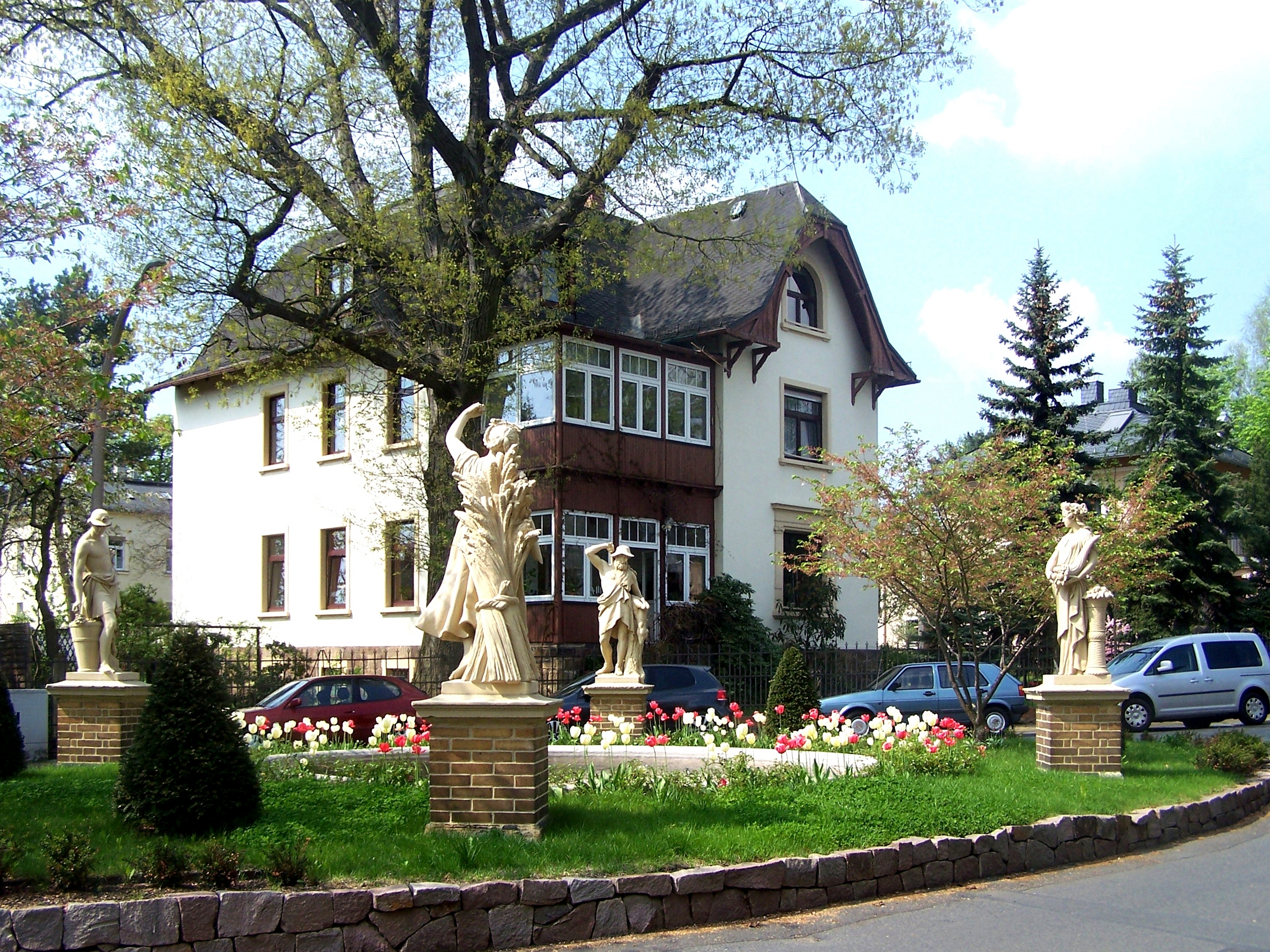 Mietvilla Dr.-Schmincke-Allee 21, am nordwestlichen Rand des Fontainenplatzes in der Dr.-Schmincke-Allee, Radebeul